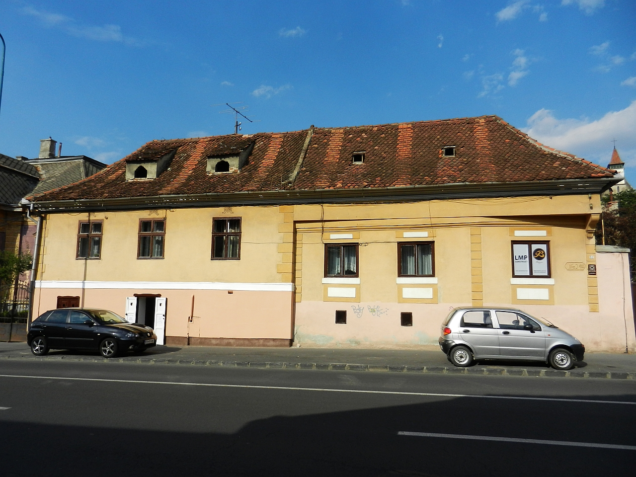 Casa monument istoric (Lunga 82)